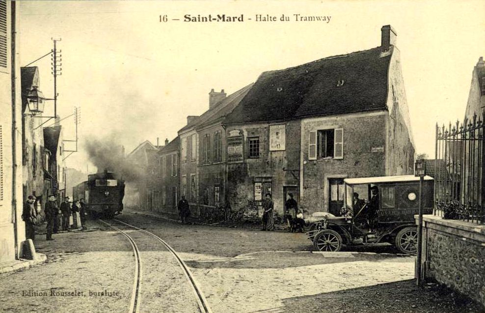 Train à vapeur du Tramway de Meaux à Dammartin avec un train de voyageurs à la halte de Saint-Mard (village).